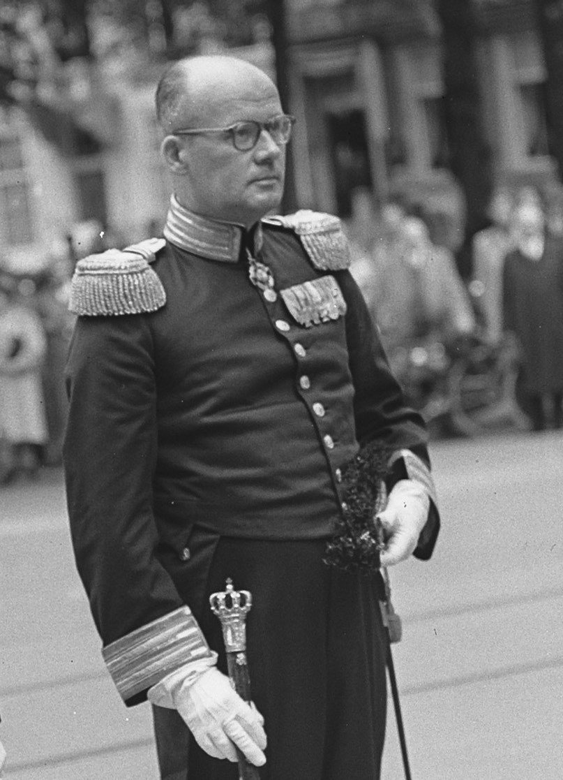 Collectie / Archief : Fotocollectie Anefo Reportage / Serie : Nieuwe ambassadeurs bieden koningin Juliana hun geloofsbrieven aan Beschrijving : De nieuwe Sovjet ambassadeur en Jhr. D.G. de Graeff Datum : 4 september 1953 Trefwoorden : ambassadeurs, koningin Persoonsnaam : Graeff, D.G. de Fotograaf : Bilsen, Joop van / Anefo Auteursrechthebbende : Nationaal Archief Materiaalsoort : Glasnegatief Nummer archiefinventaris : bekijk toegang 2.24.01.09 Bestanddeelnummer : 905-9304